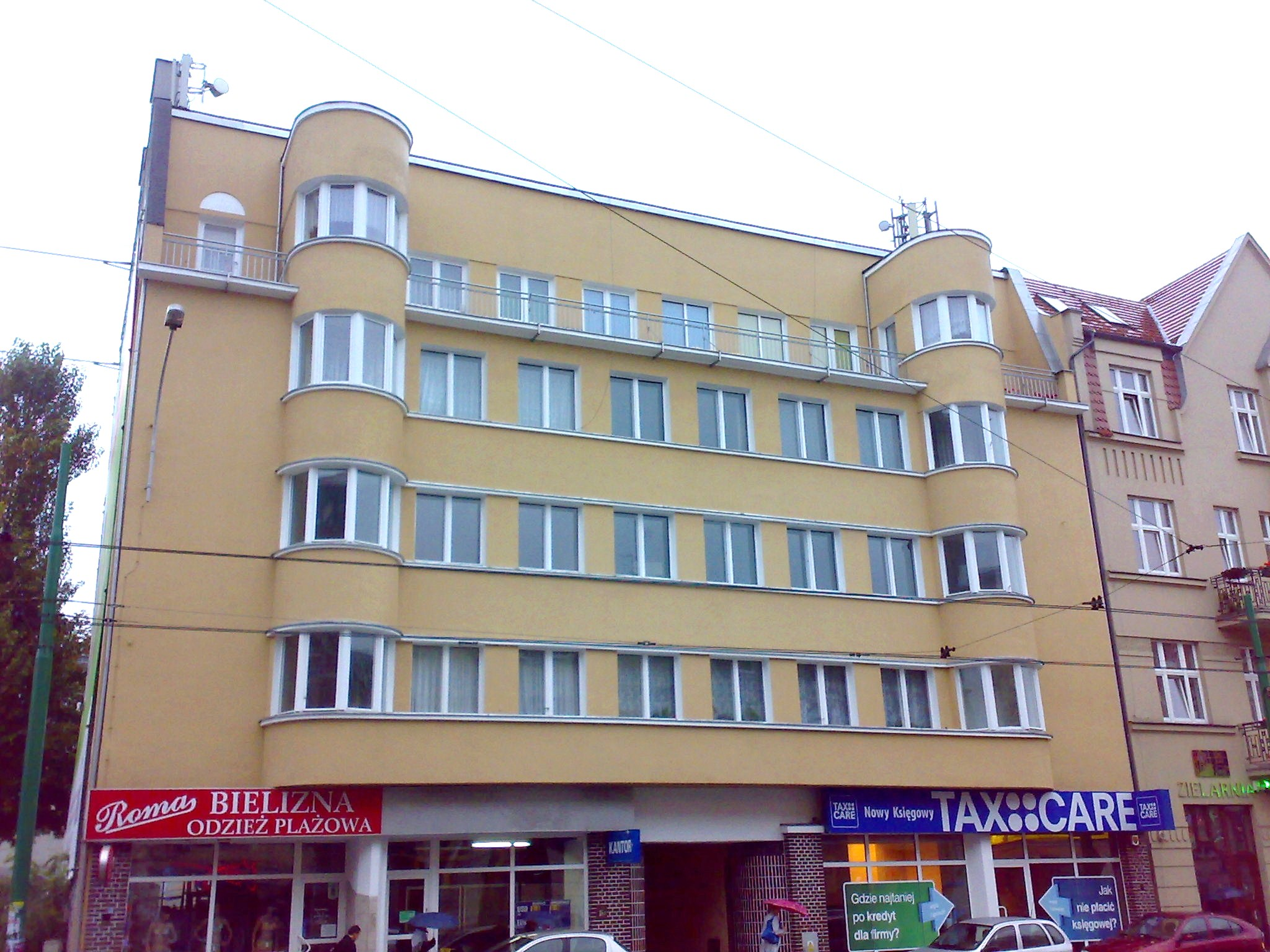 Poznań, modern building in Dąbrowskiego Street.